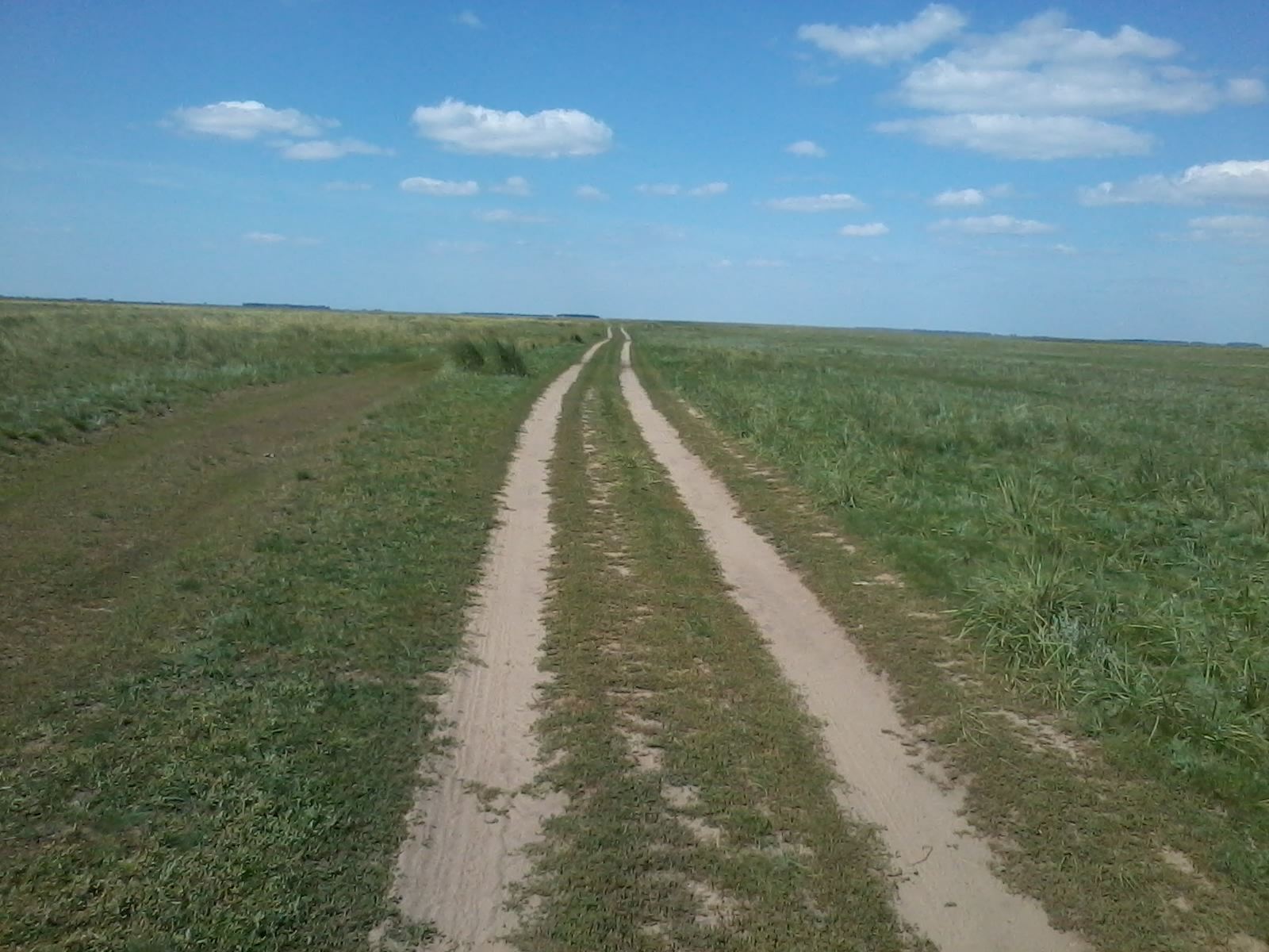 Степь